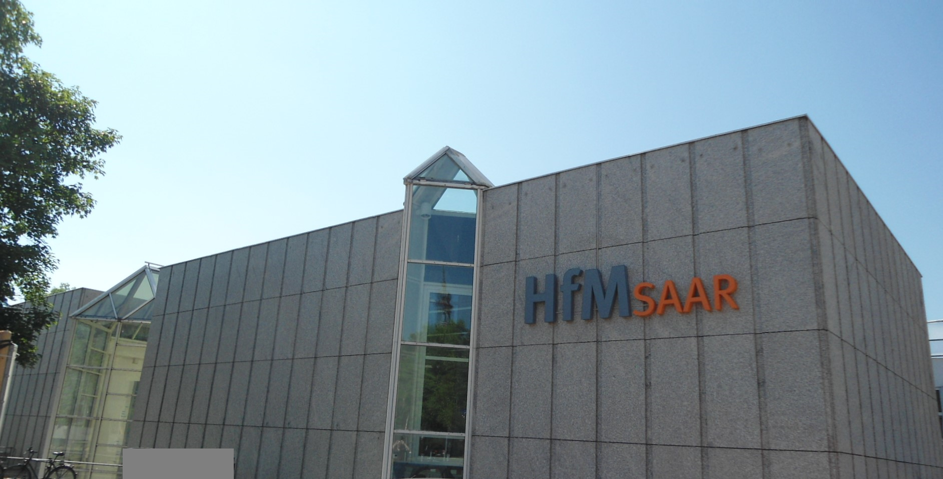 HFM Saarbrücken